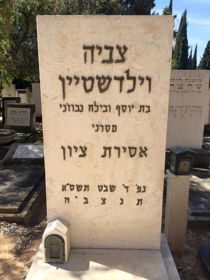 מצבתה של צביה וילדשטיין בבית העלמין גבעתיים